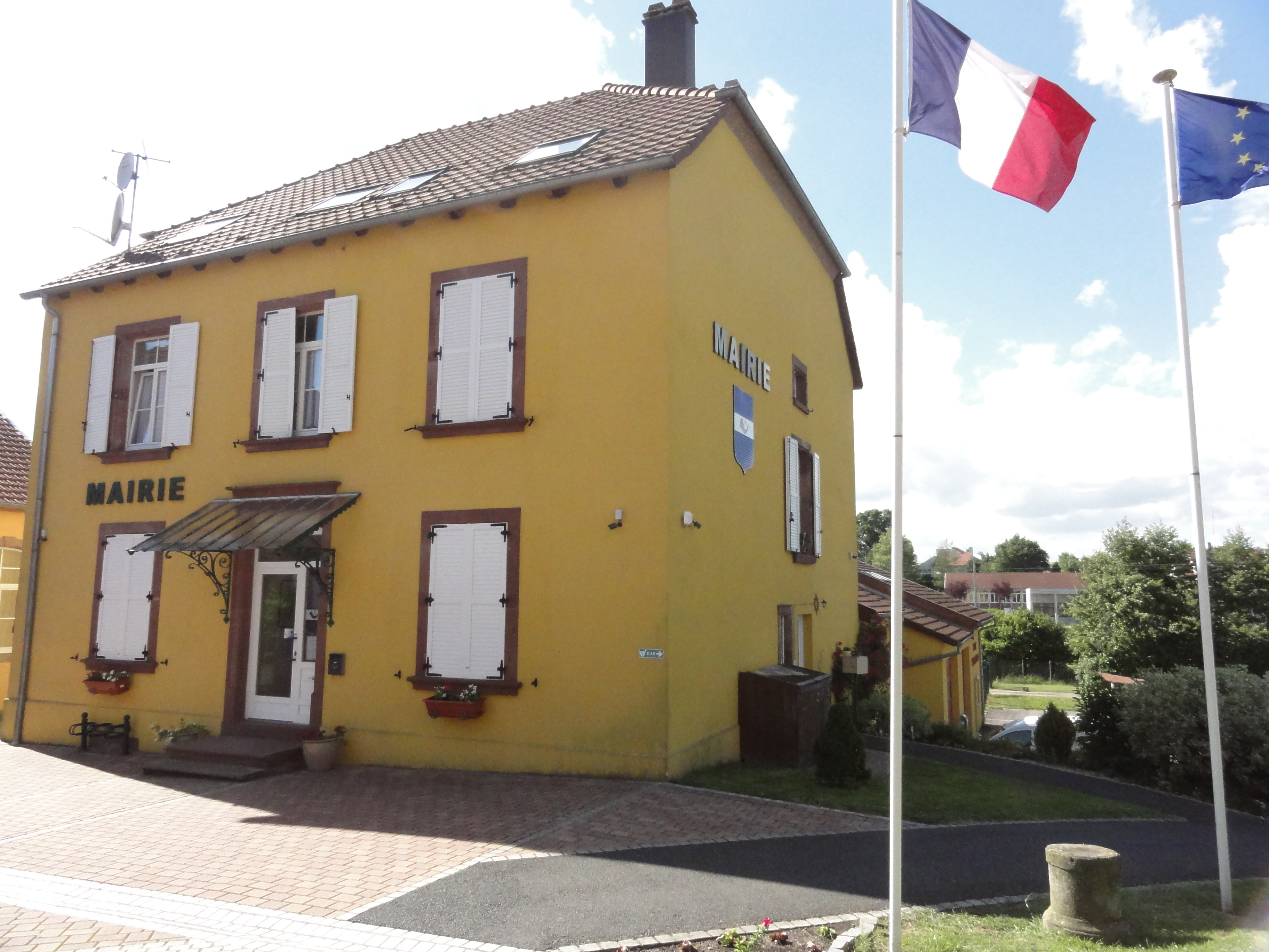 Hommarting (Moselle) mairie